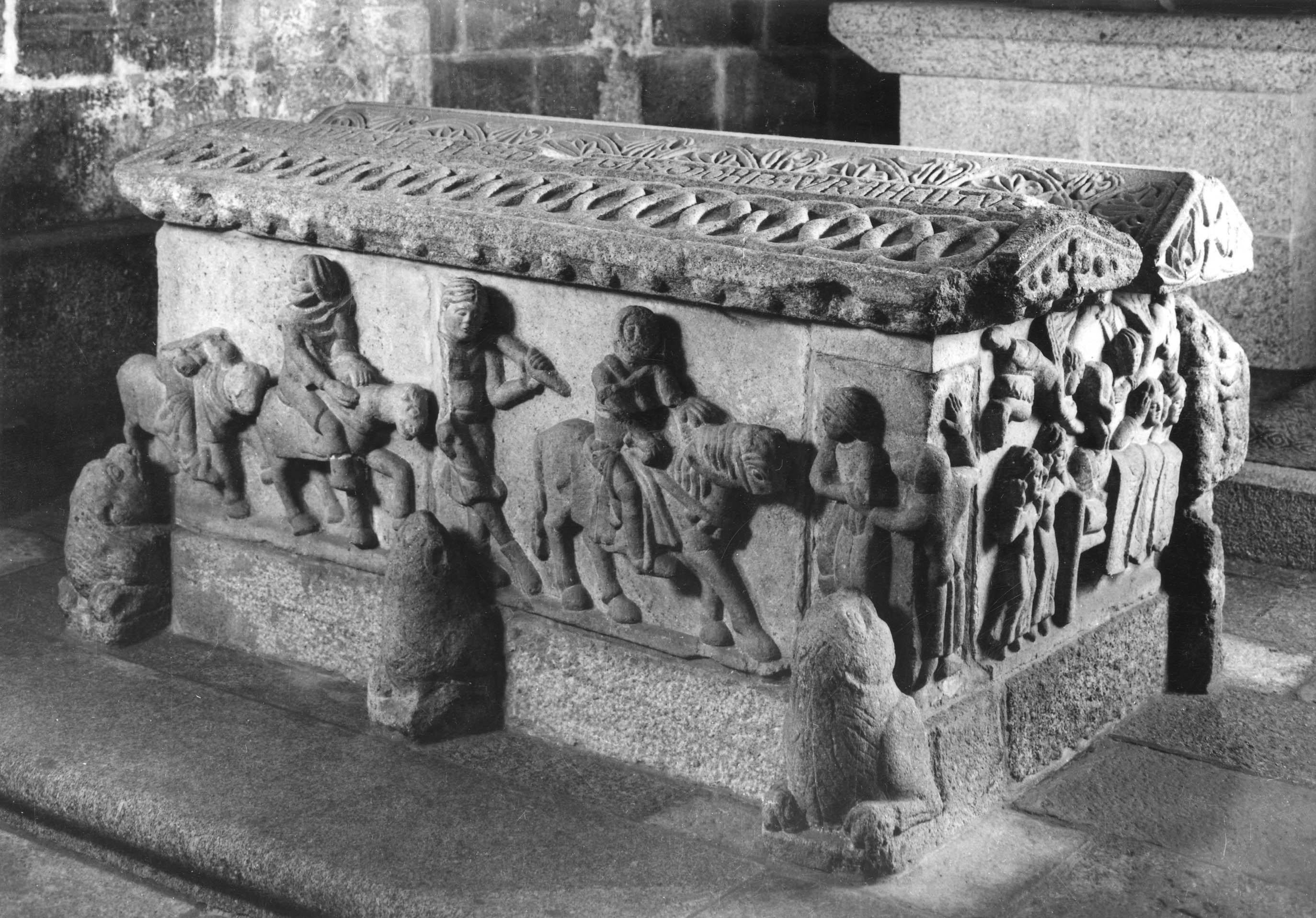 Túmulo de Egas Moniz. Fotógrafo: Mário Novais, 1899-1967. Orientador científico: Mário Tavares Chicó, 1905-1966. Data aproximada de produção da fotografia original: 1954. [CFT015.292.ic]